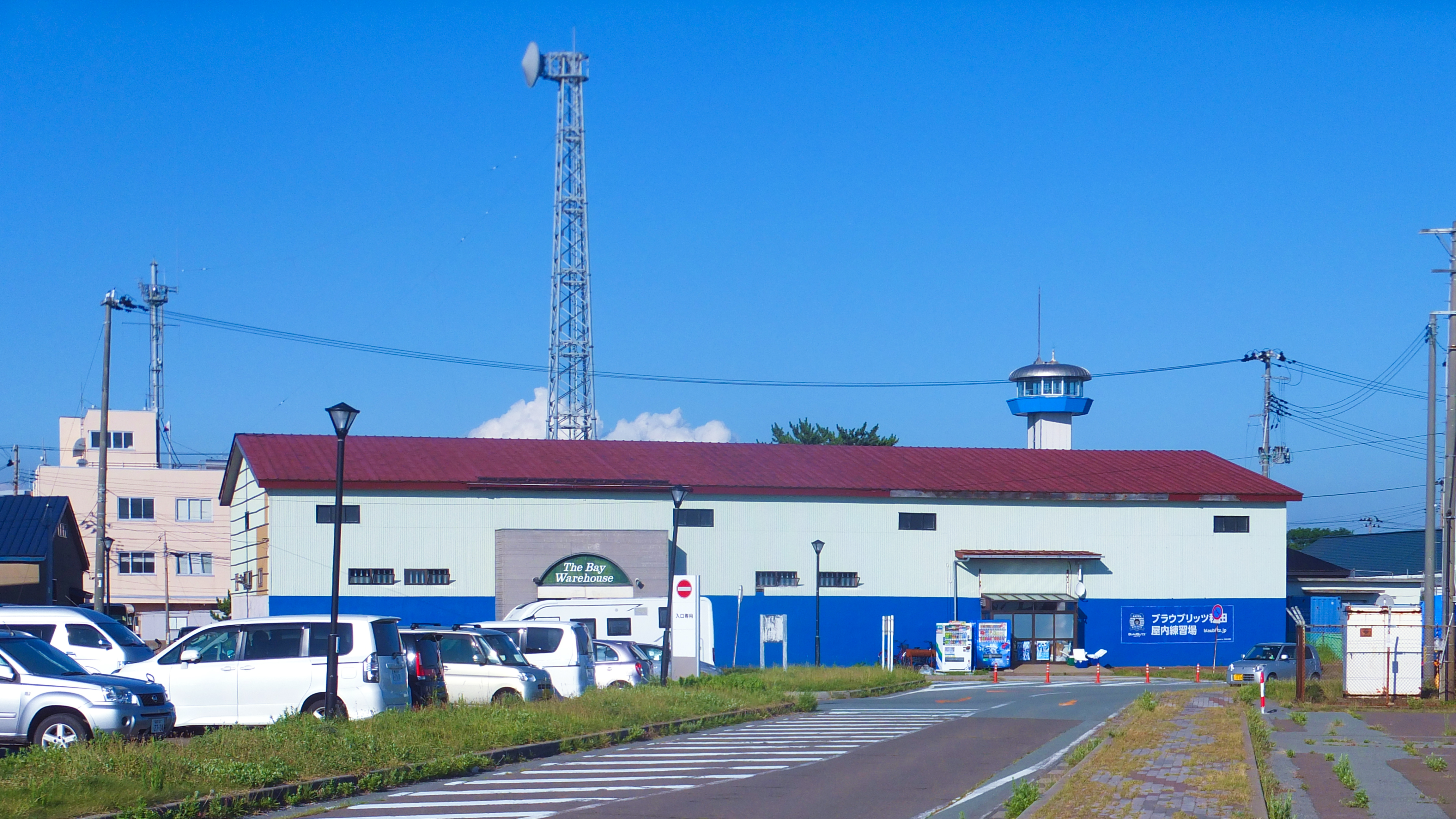 ブラウブリッツ秋田の屋内練習場（秋田市土崎港）